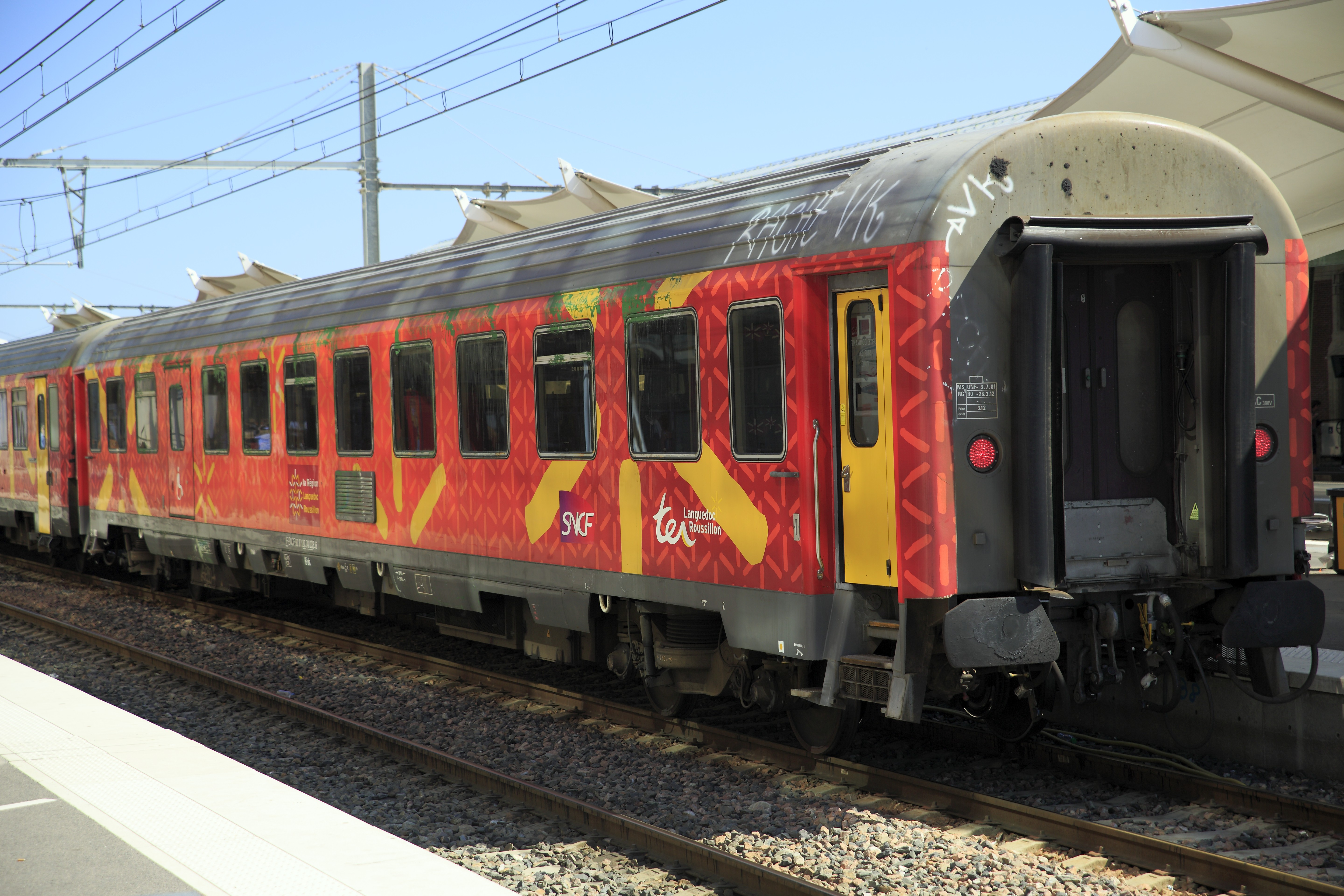 Corail-Halbgepäckwagen im Lack- oder besser Folienmuster des Regionalverkehrs Languedoc-Rousillon. Der Wagen wurde als Abteilwagen geliefert, erkennbar an den endständigen Einstiegen. Für den Einsatz im Regionalverkehr wurde er zum Großraumwagen umgebaut, der ehemalige Gepäckraum dient dem Transport von Rollstühlen. Die überbreiten Pufferteller für den Verkehr mit der iberischen Halbinsel wurden beibehalten, obwohl nur die wenigsten Corailwagen jemals in Spanien waren. Eigentlich betraf es ohnehin nur Liegewagen. International ist auch dieser Wagen nicht mehr zugelassen.